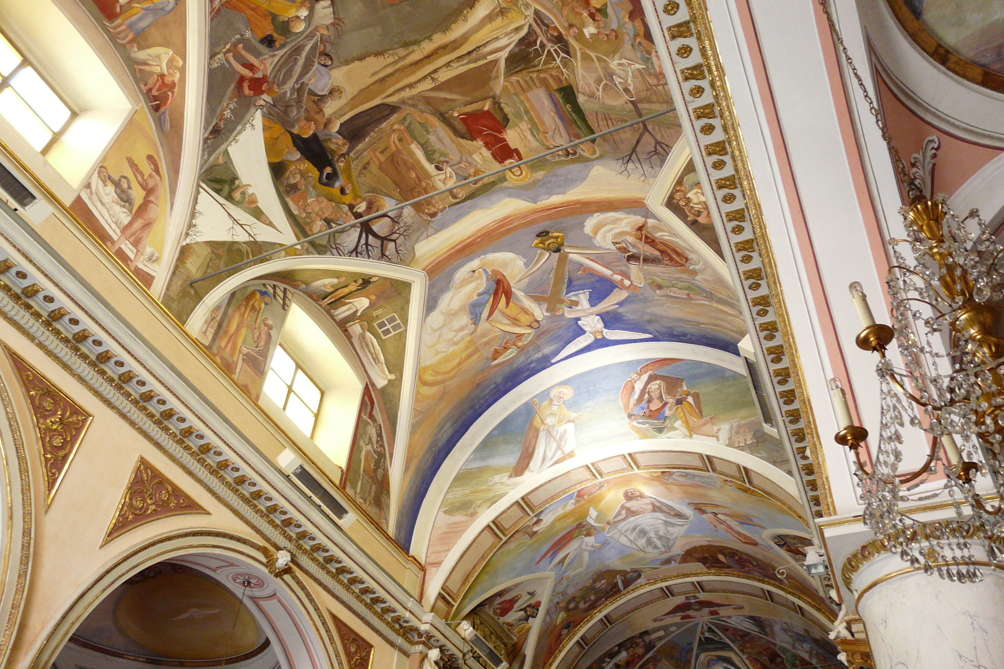 Chiesa di Sant'Ambrogio, Zoagli, Liguria, Italia